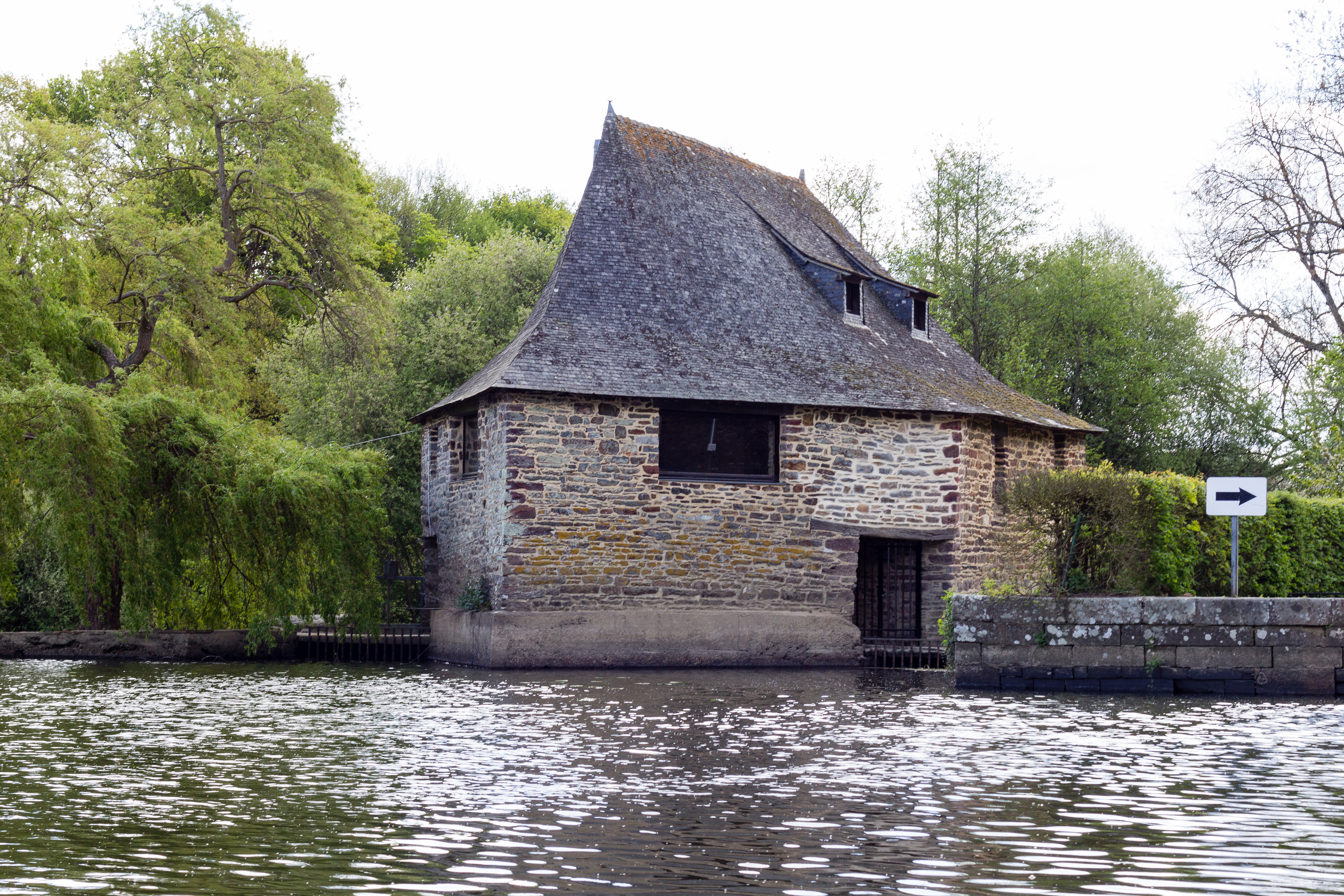 Élévation amont en forme d'éperon du moulin de la Molière (Saint-Senoux, France).